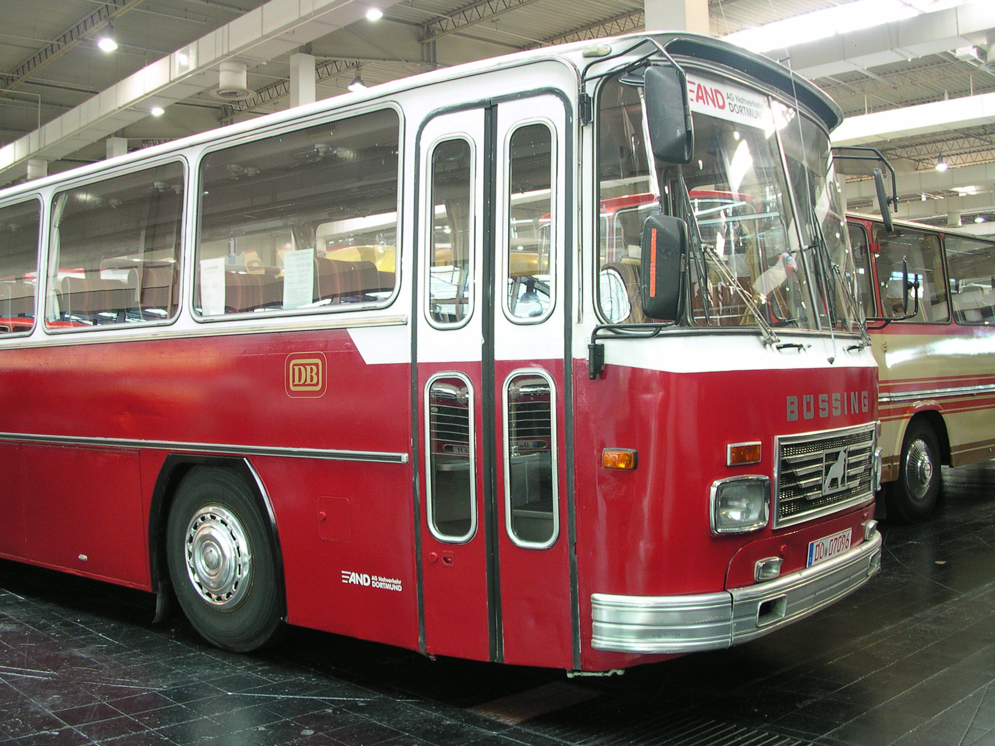 Nutzfahrzeug-IAA 2004 in Hannover, Büssing Bahnbus.